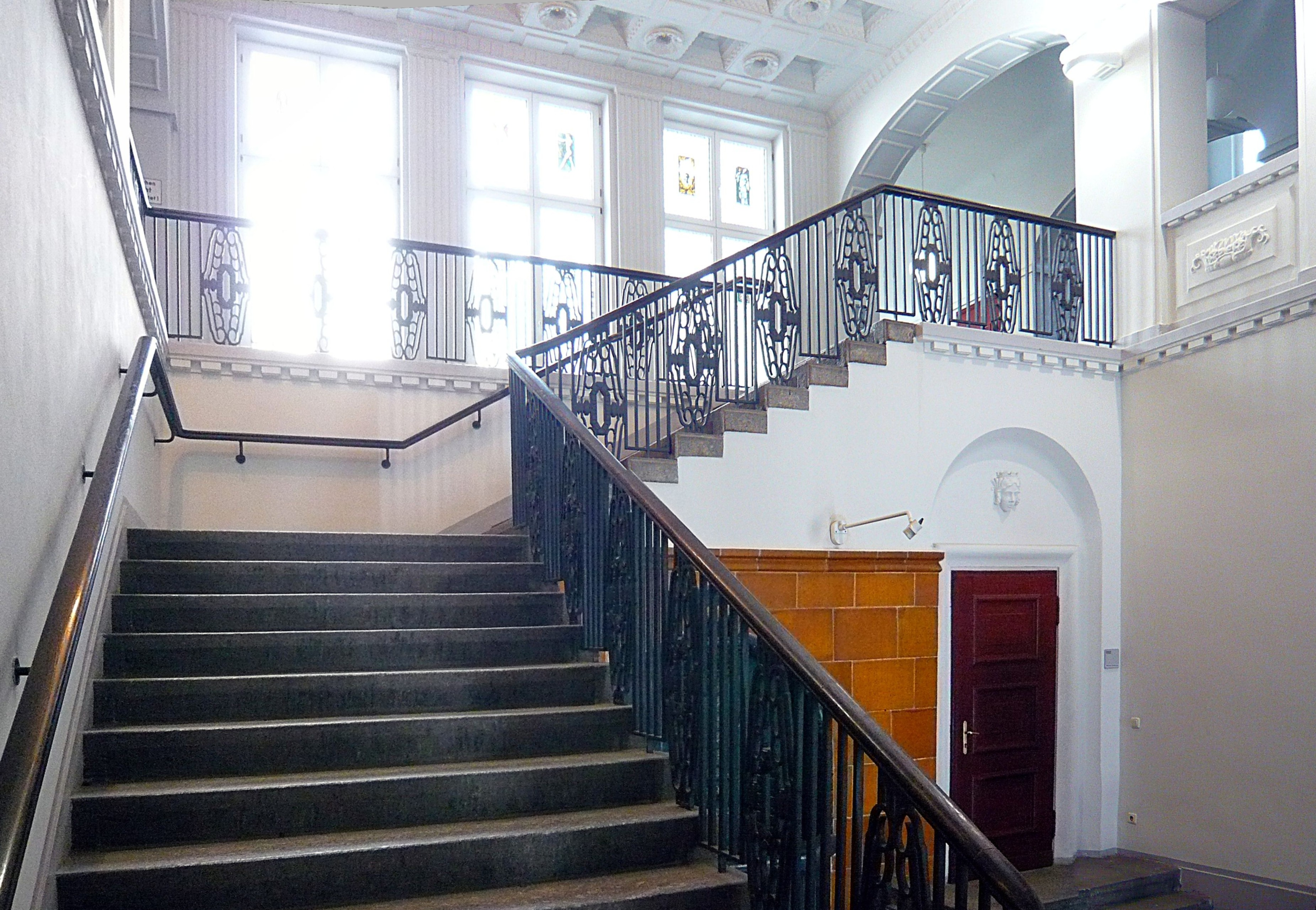 Schneeberg, Rathaus: Treppe im Foyer